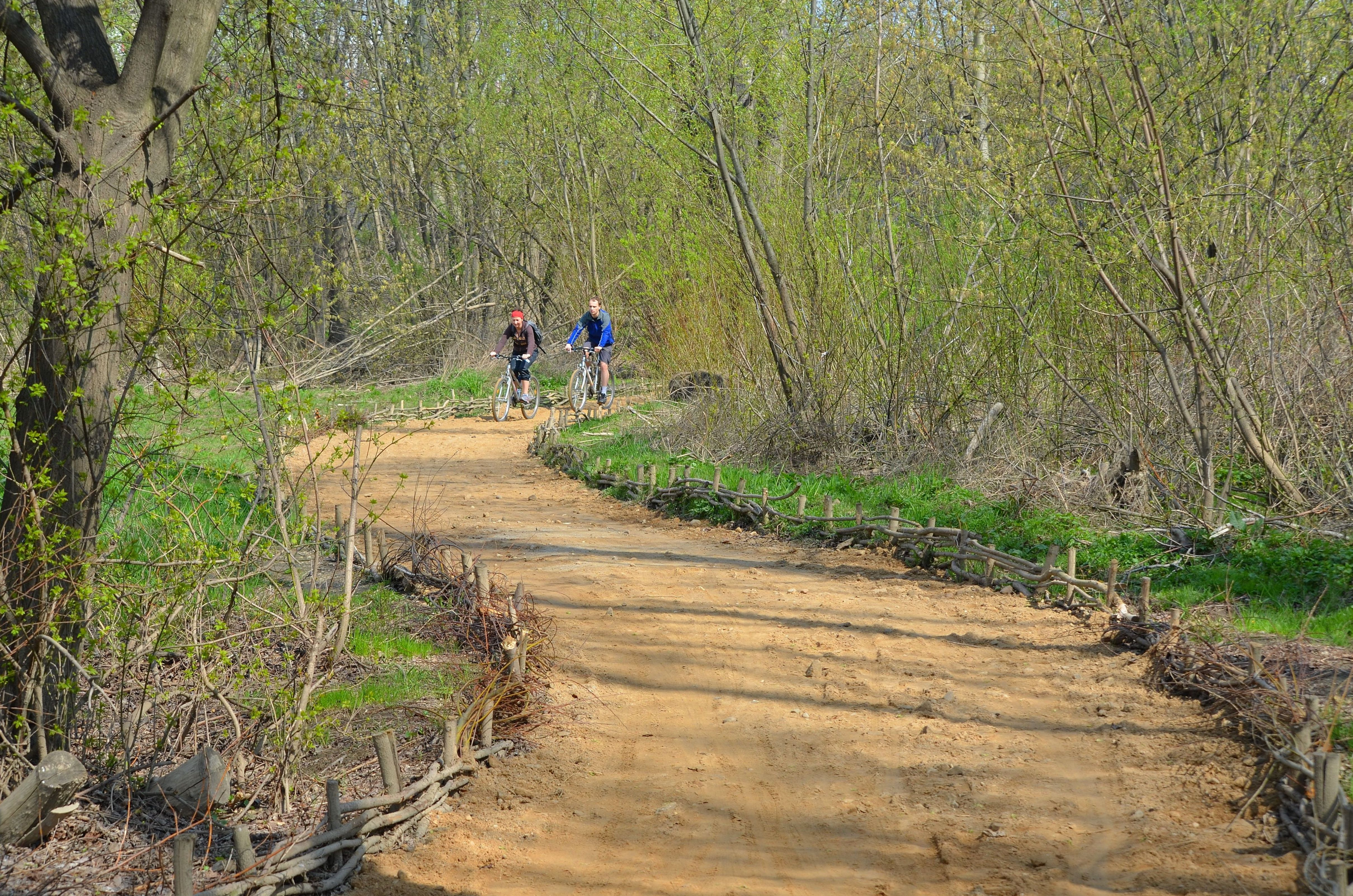 Ścieżka rowerowa po praskiej stronie Wisły w Warszawie